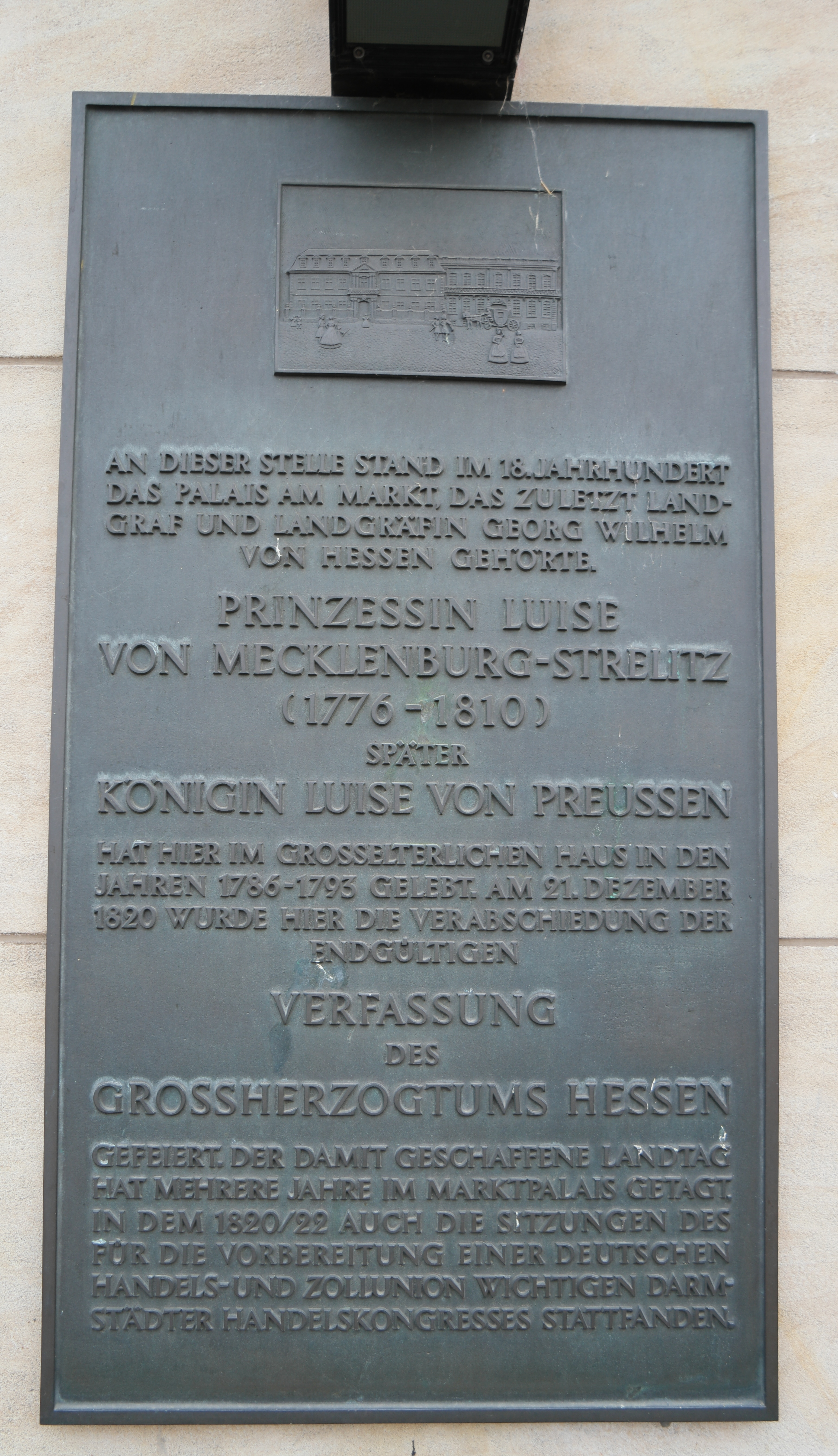 Gedenktafel für die Verfassung des Großherzogthums Hessen von 1820 am Darmstädter Marktplatz